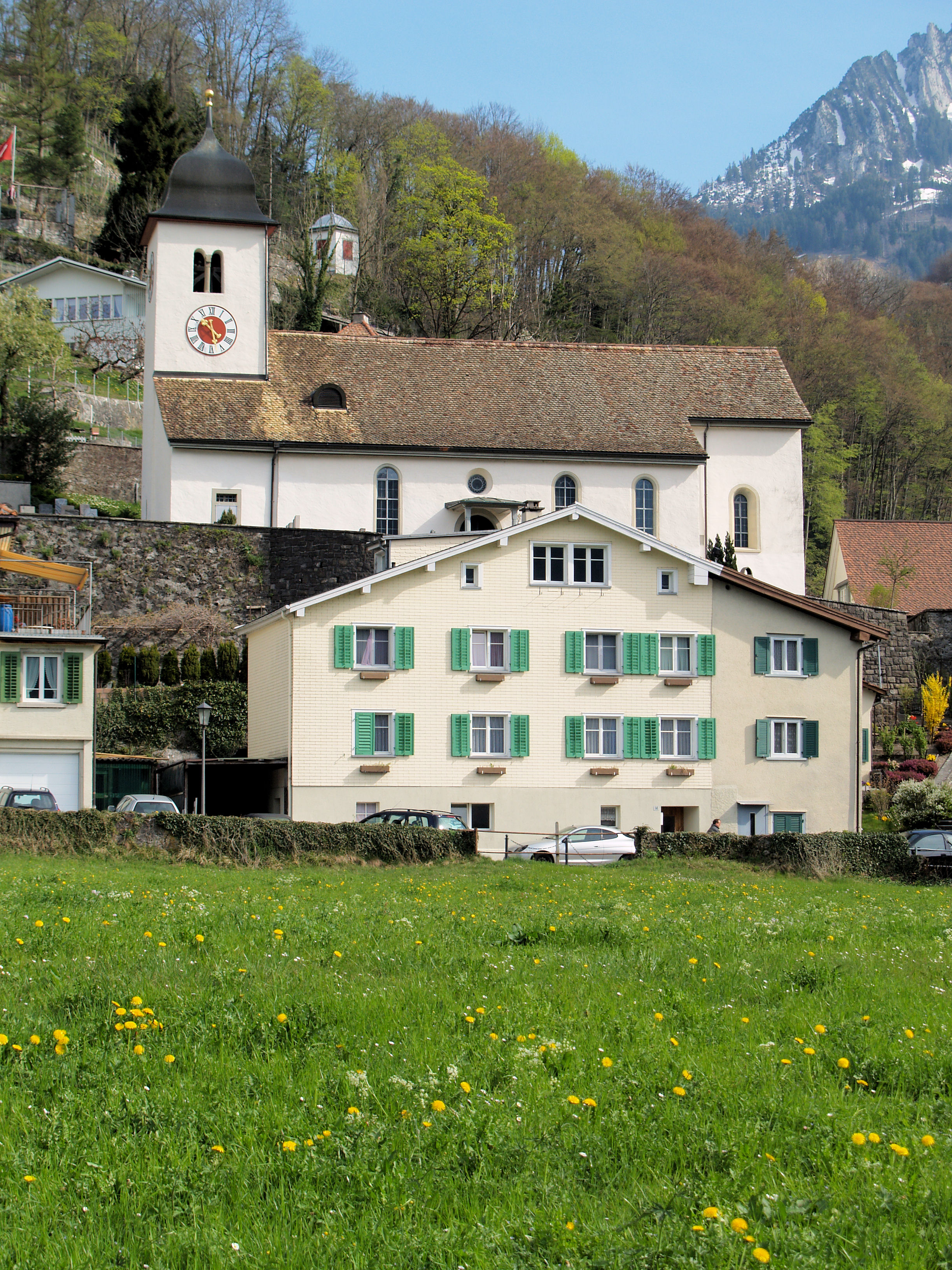 Die Heiligkreuzkirche auf dem Bühl in Weesen